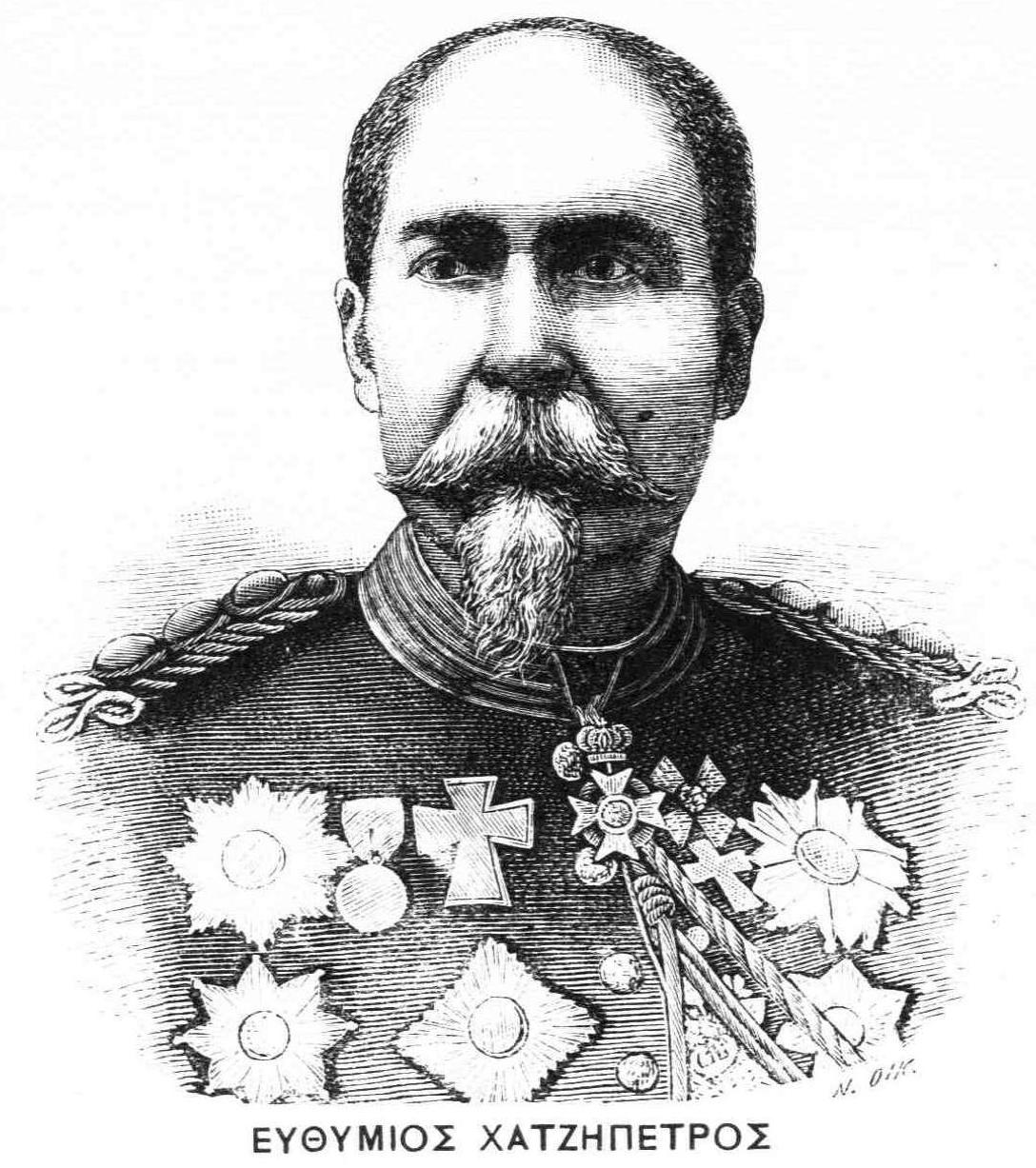 Efthymios Christodoulos Chatzipetros, griechischer General (Nafplio 1830/1833 - Athen 1890)